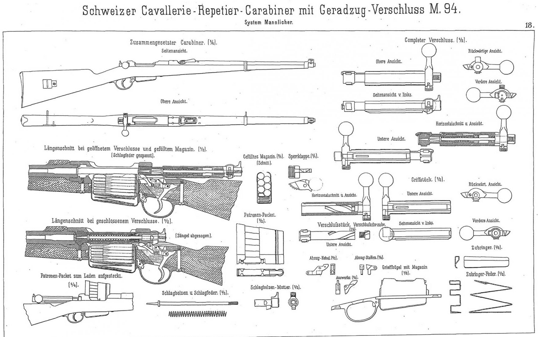 Skica avstrijsko-švicarske premovlečne repetrike Mannlicher M1893.